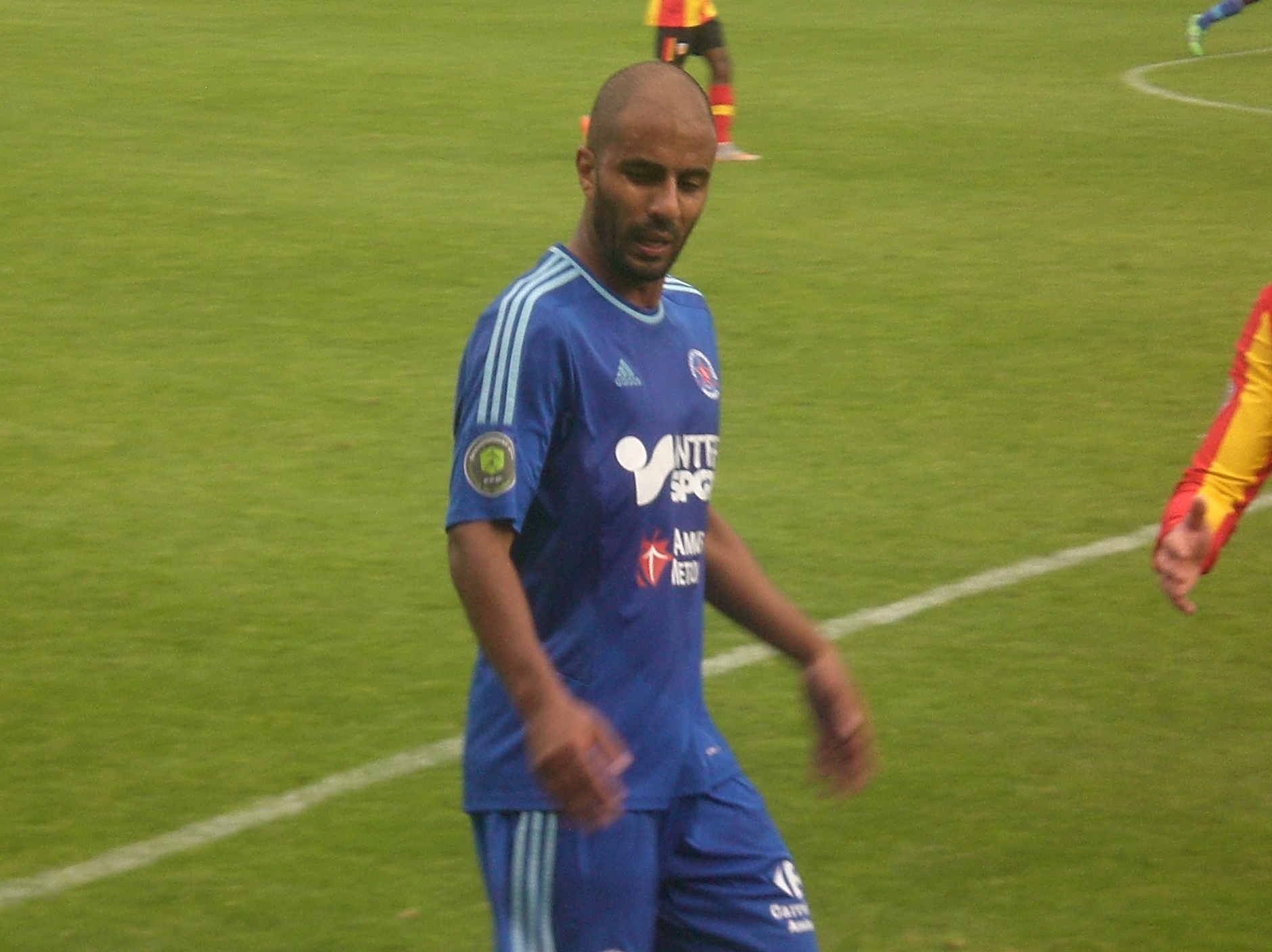 Belkacem Zobiri lors du match RC Lens B / AC Amiens, comptant pour la cinquième journée du Championnat de France de football amateur (CFA), le 12 septembre 2015, au Stade François Blin d'Avion.